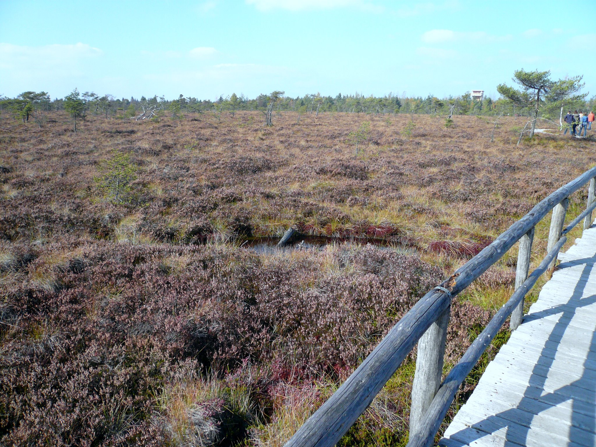 Schwarzes Moor